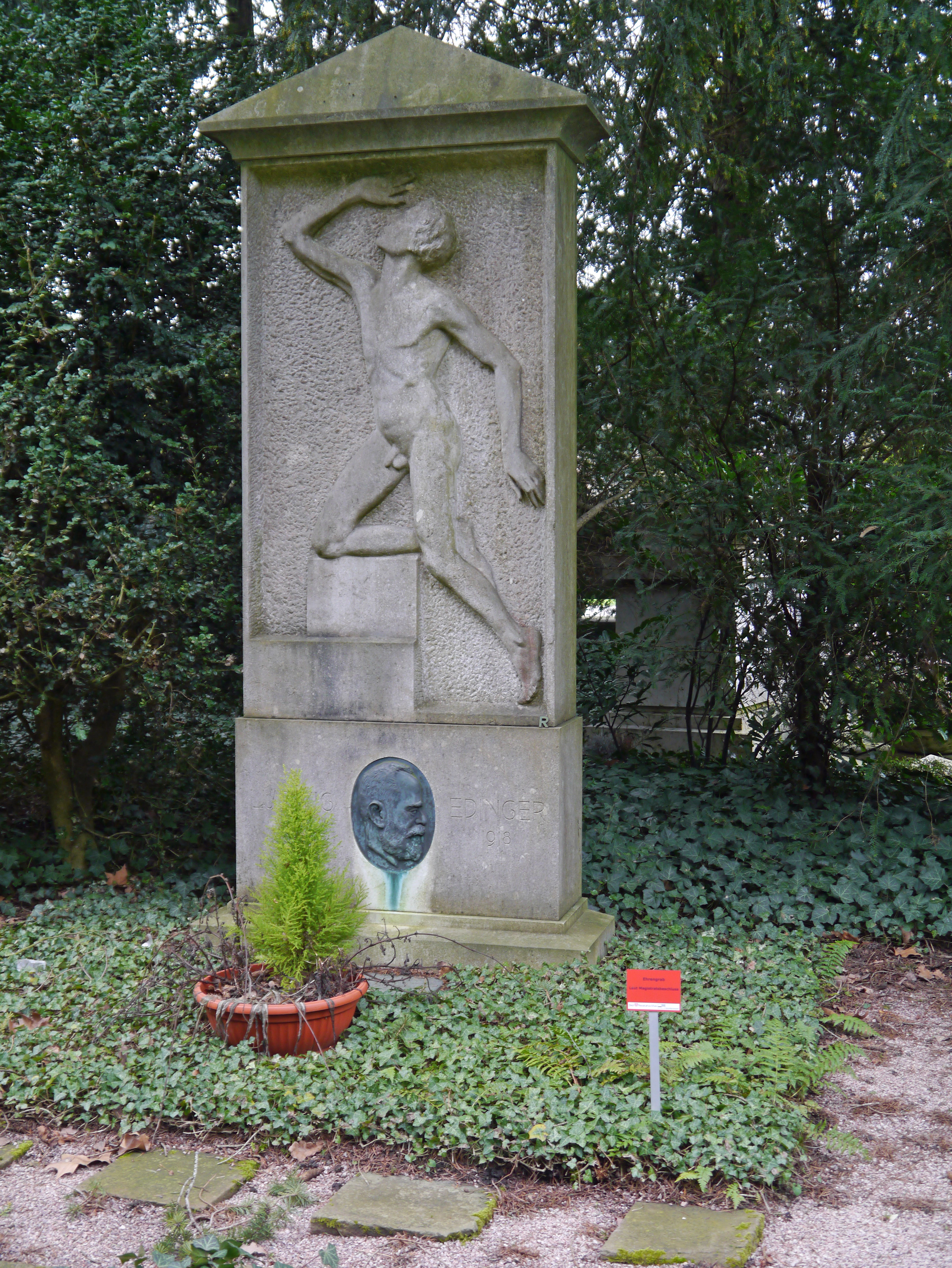 Grab von Ludwig Edinger auf dem Frankfurter Hauptfriedhof.